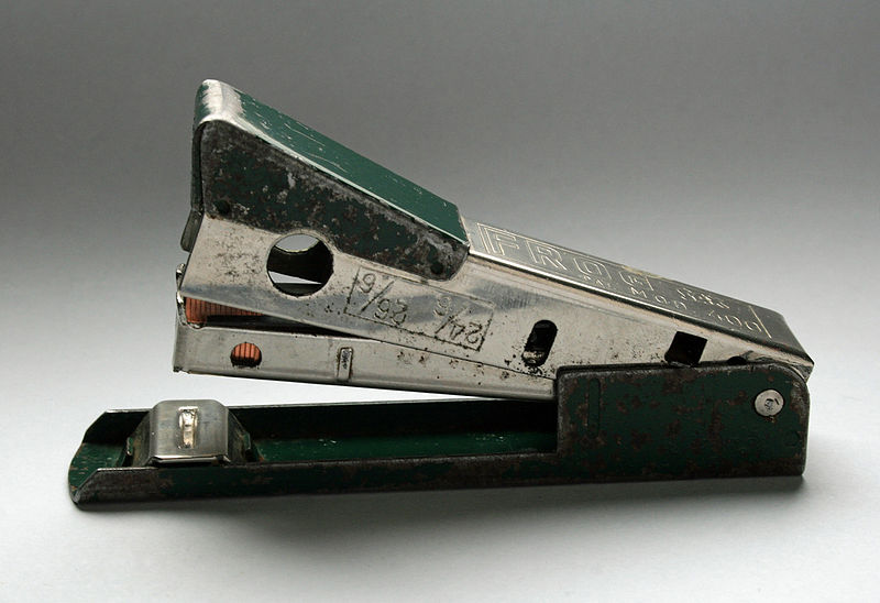 populair nietapparaat in Oostenrijk in de jaren 60 70